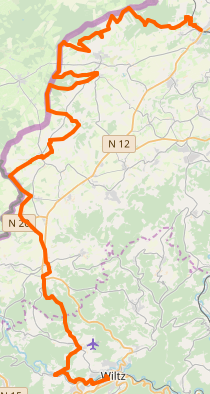 Streck vum Panorama-Pad